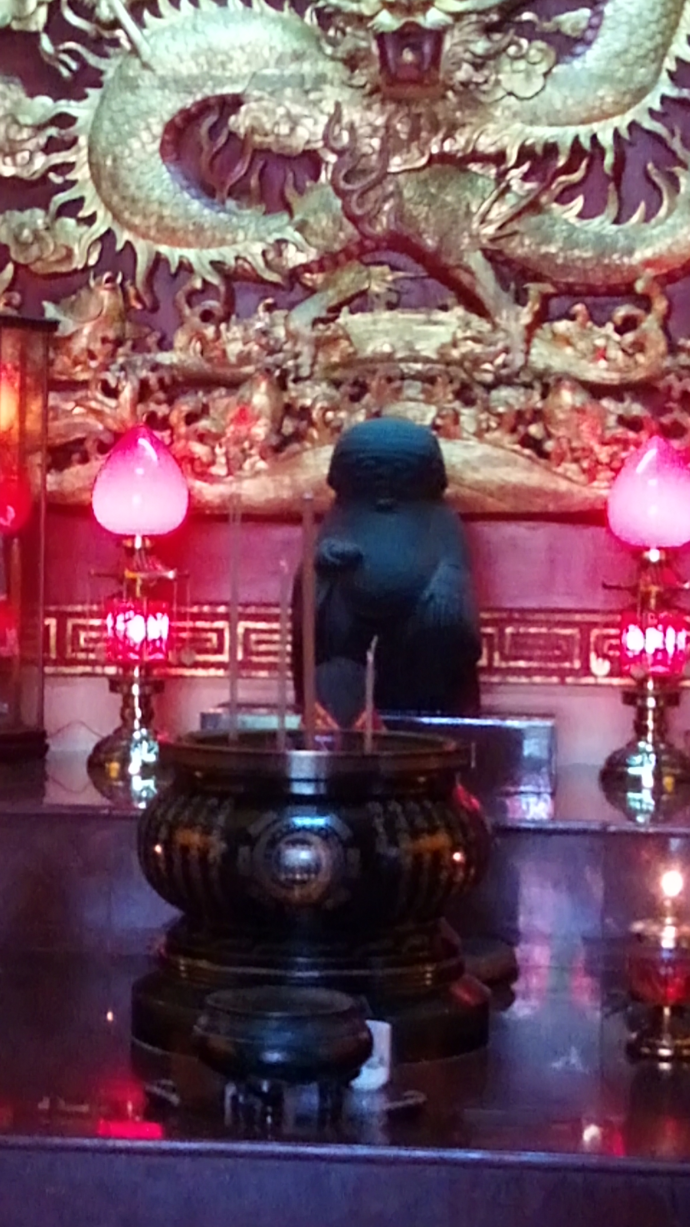 中文（台灣）: 台中市南屯區鎮平福德祠石頭公